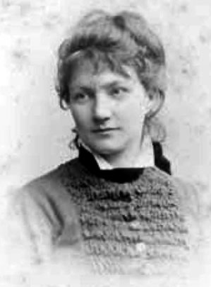 Elisabeth Lemke w młodości